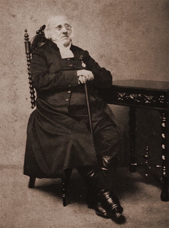 Kyrkoherden i Malmö S:t Petri kyrka Anders Petter Gullander.